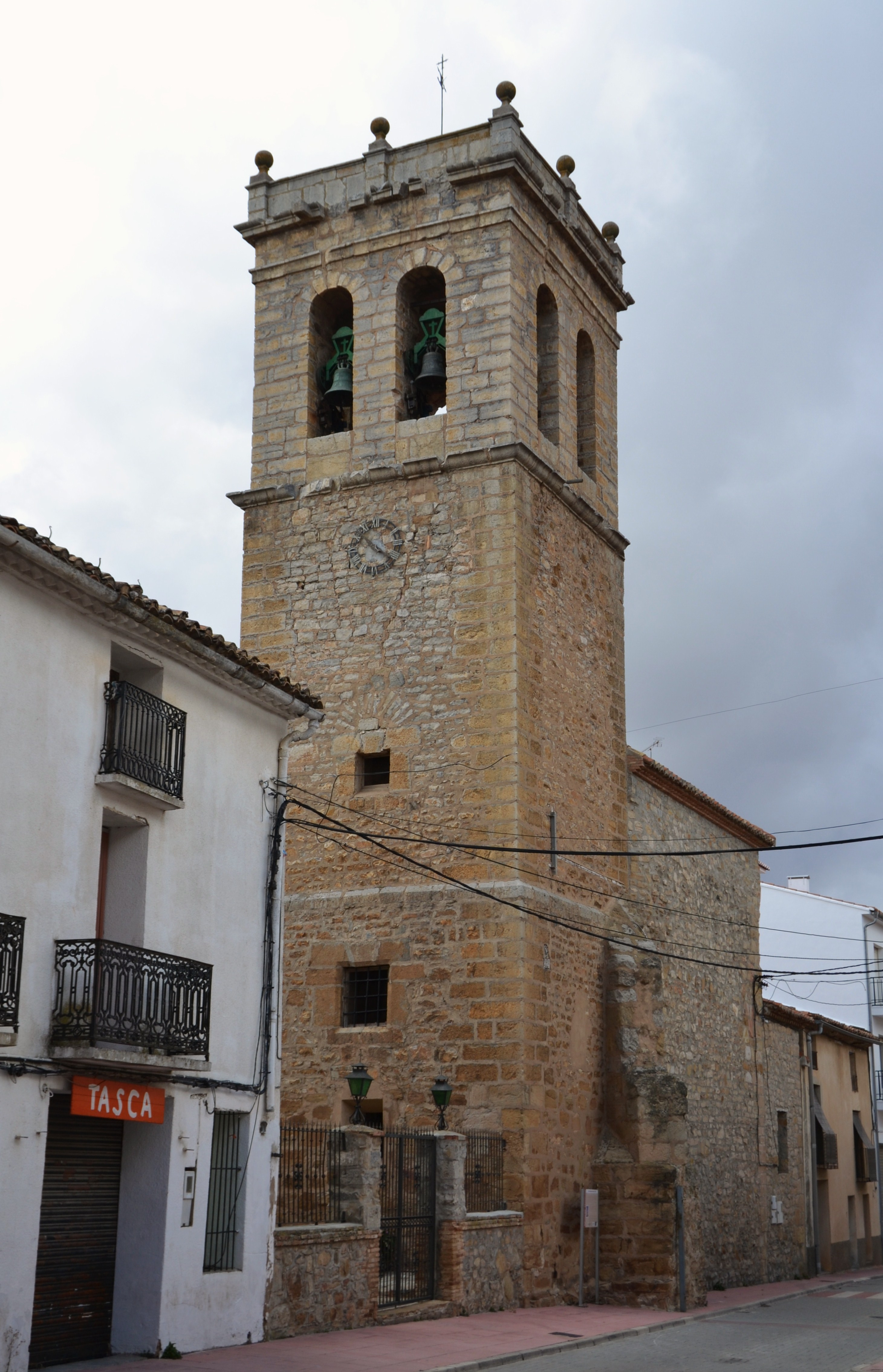 Campanar de l'església de sant Pere de Barraques.